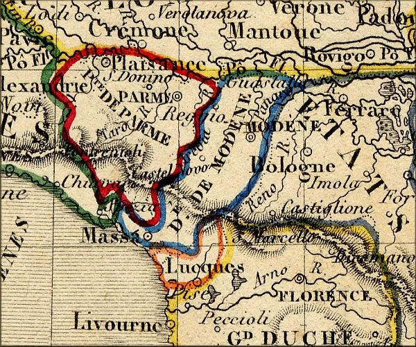 carta del Ducato di Parma nell'Ottocento